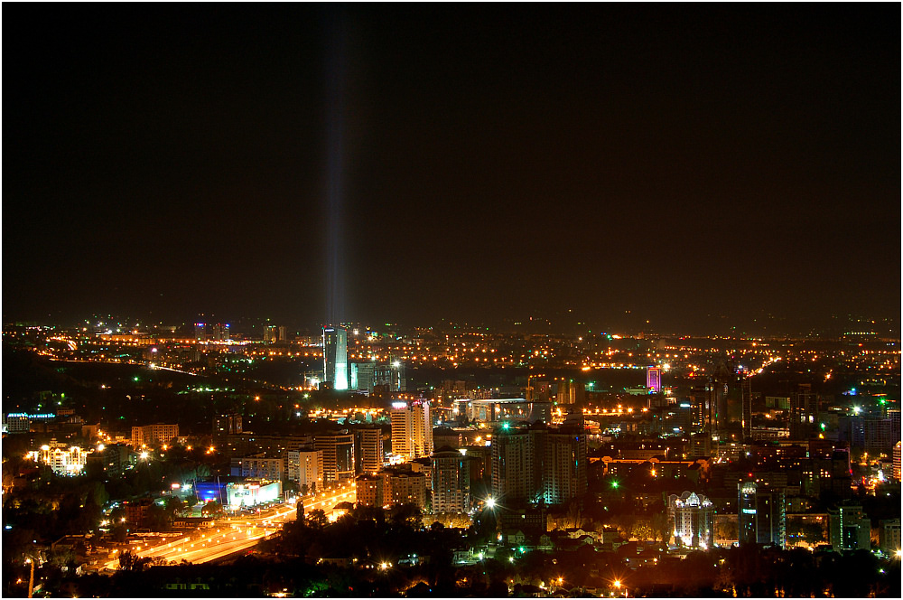 Ночной Алматы